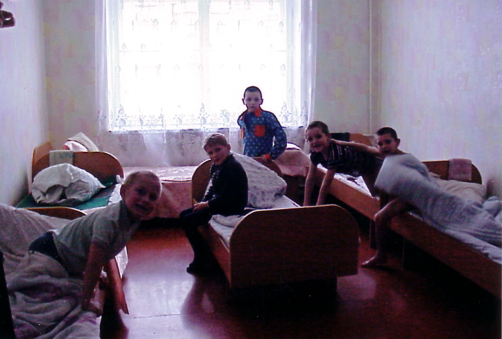 Niños durmiento en un orfanato de Ucrania